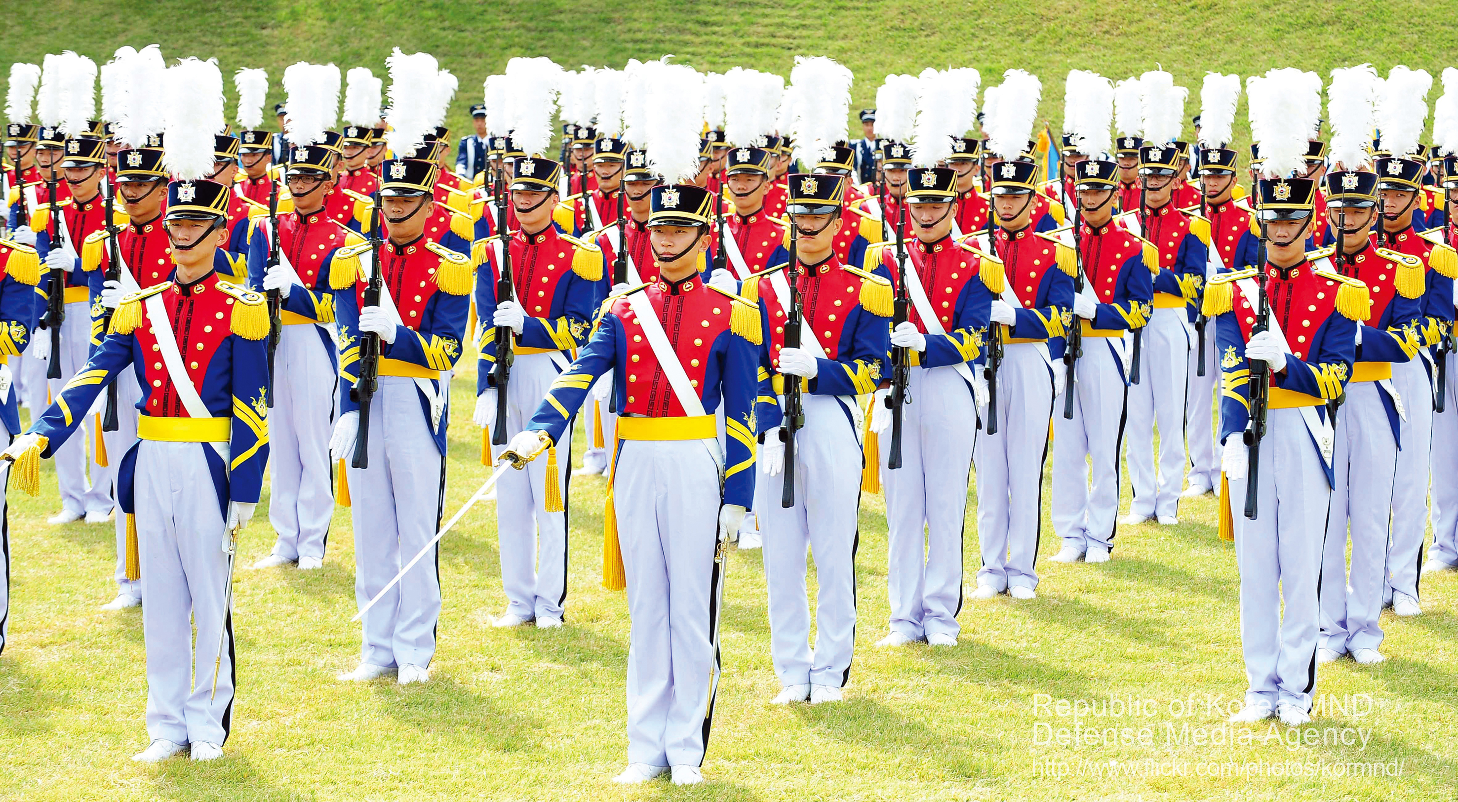 2009 국방화보 Rep. of Korea, Defense Photo Magazine 건군 제61주년 국군의 날 최종 리허설이 열린 9월 29일 충남 계 룡대에서 육군사관학교 생도들이 경례하고 있다